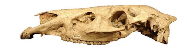 Cormohipparion occidentale FAM71800, skull lateral view